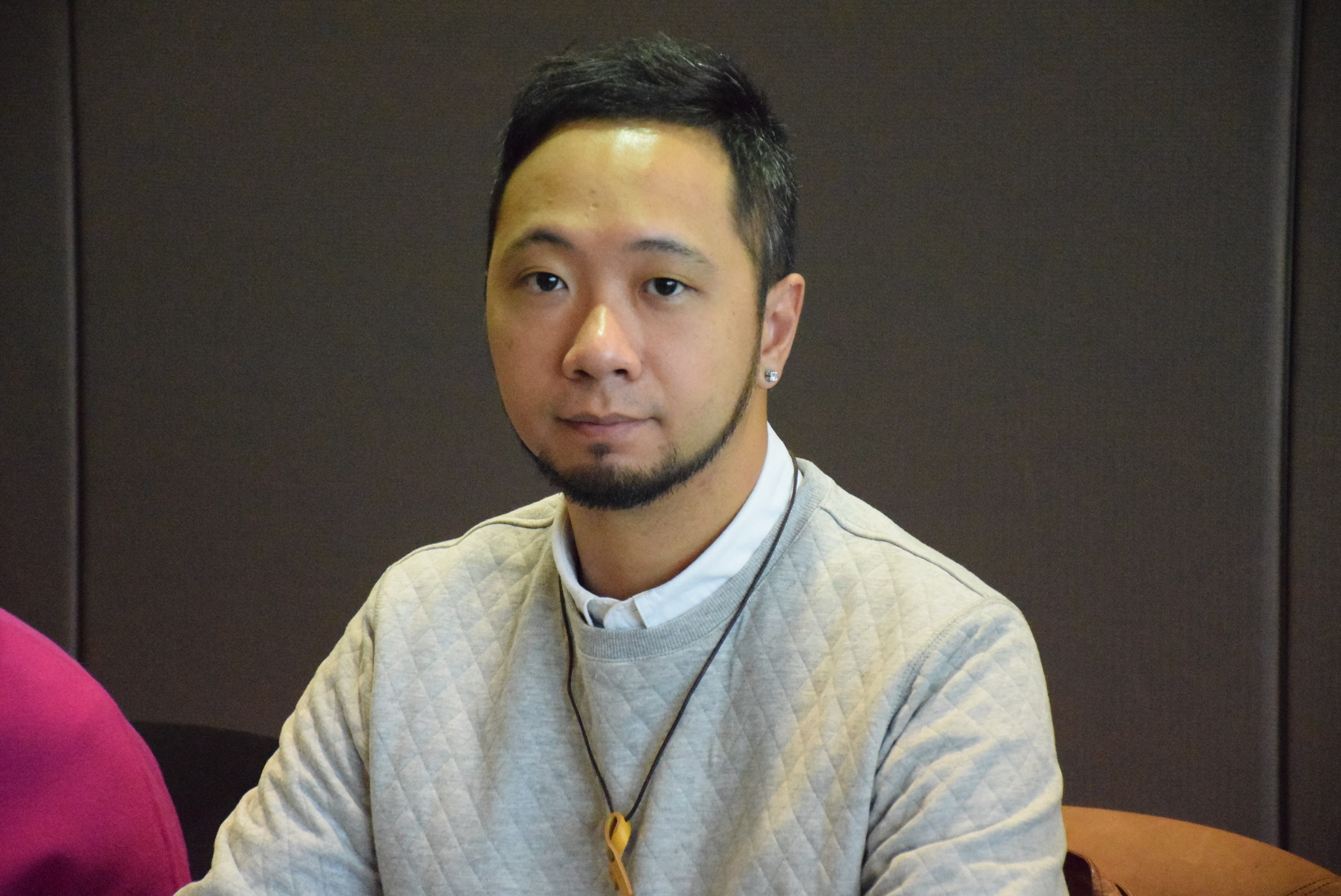 香港民間人權陣線代表曾健超 (攝影﹕美國之音記者湯惠芸)